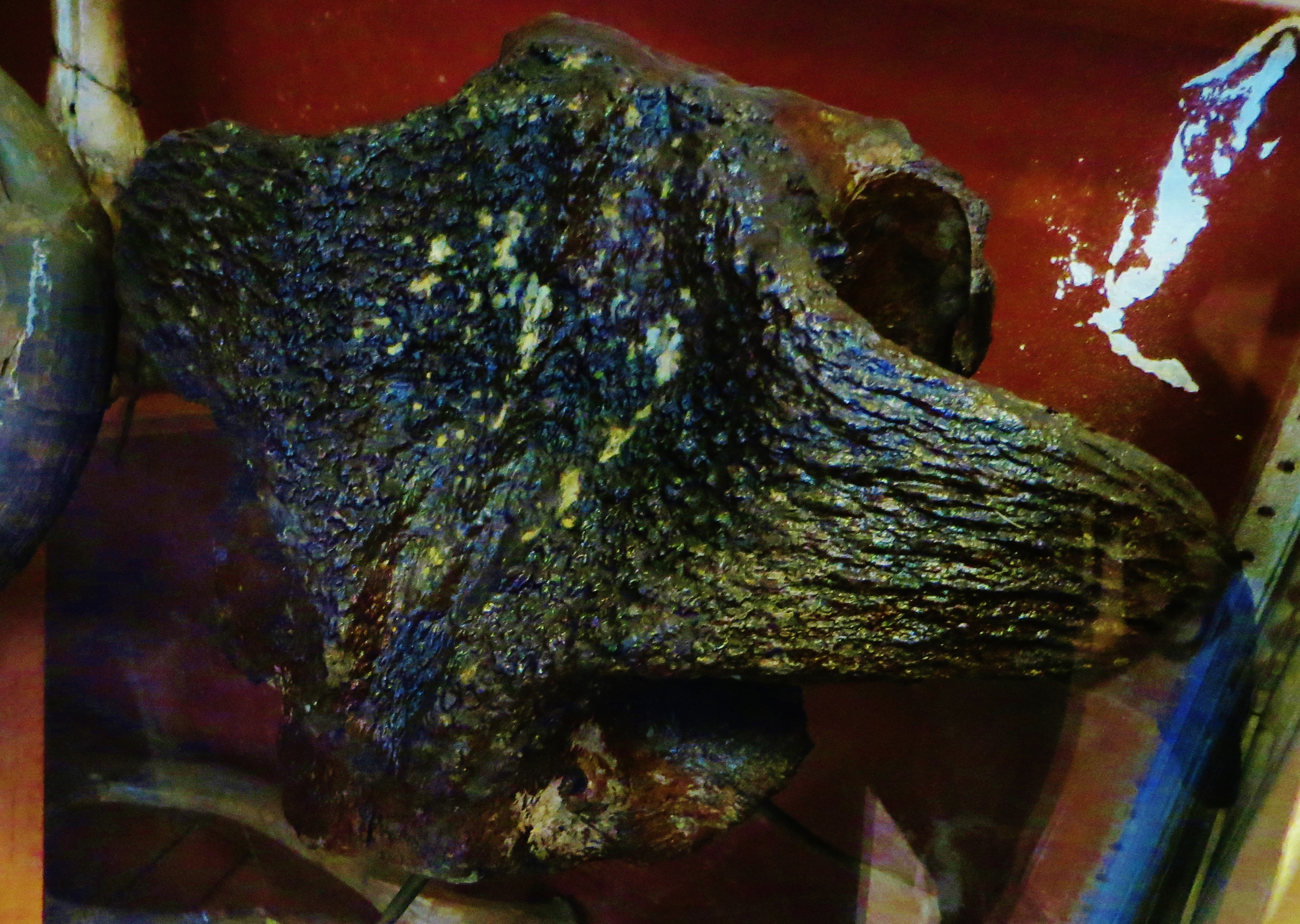 Fossil of Bootherium, an extinct mammal- Took the photo at Museum Histoire Naturelle, Paris